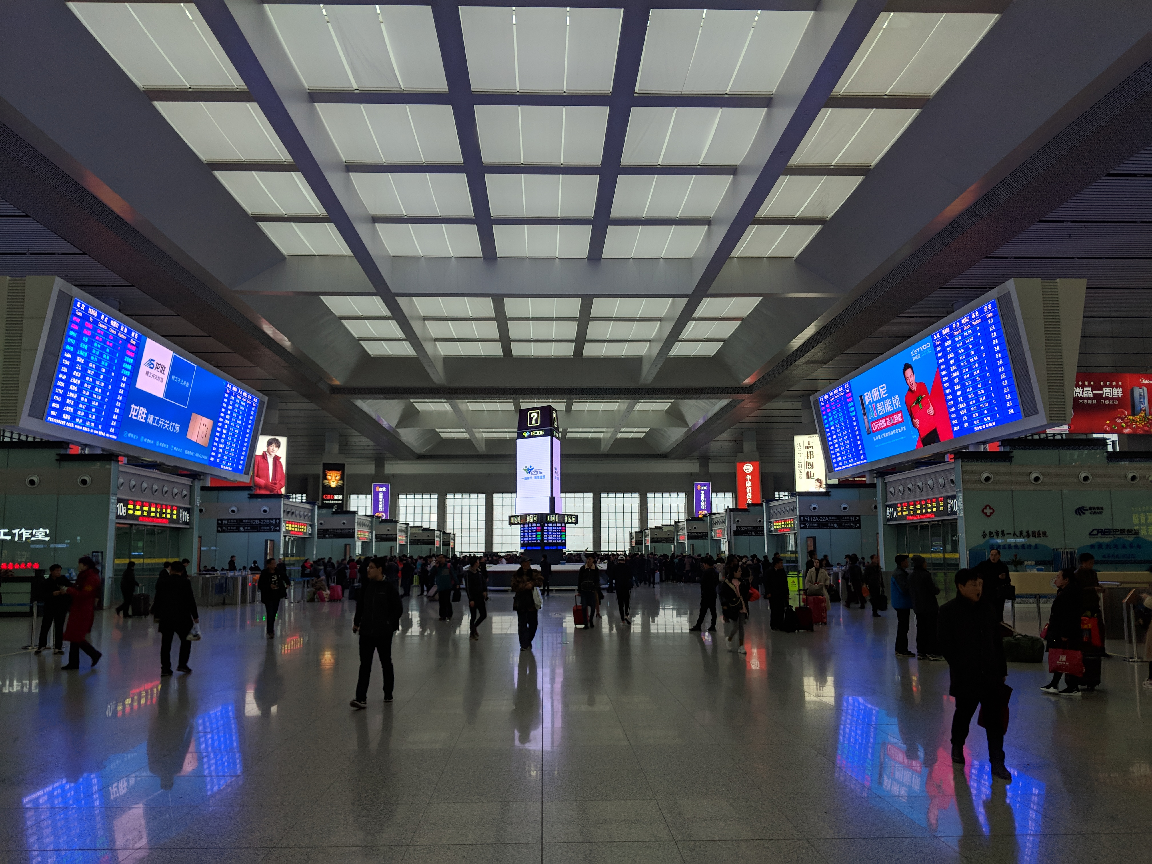 中文（中国大陆）: 合肥南站候车大厅